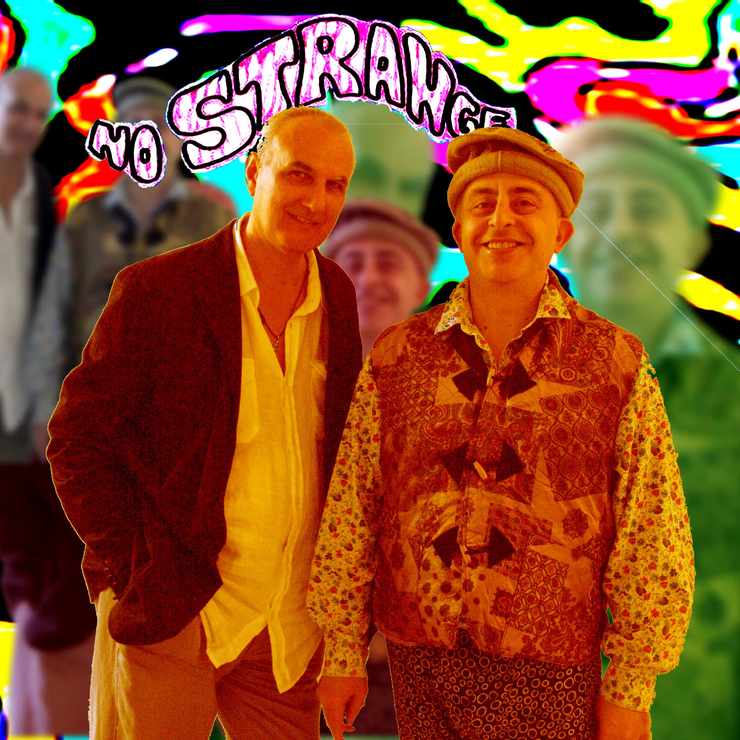 fotografia scattata con autoscatto che ritrae me, Alberto Ezzu e Salvatore D'Urso "Ursus", componenti del gruppo musicale no Strange